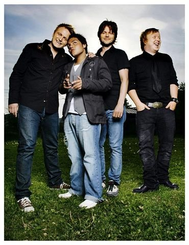 Lind, Nilsen, Fuentes & Holm i 2009